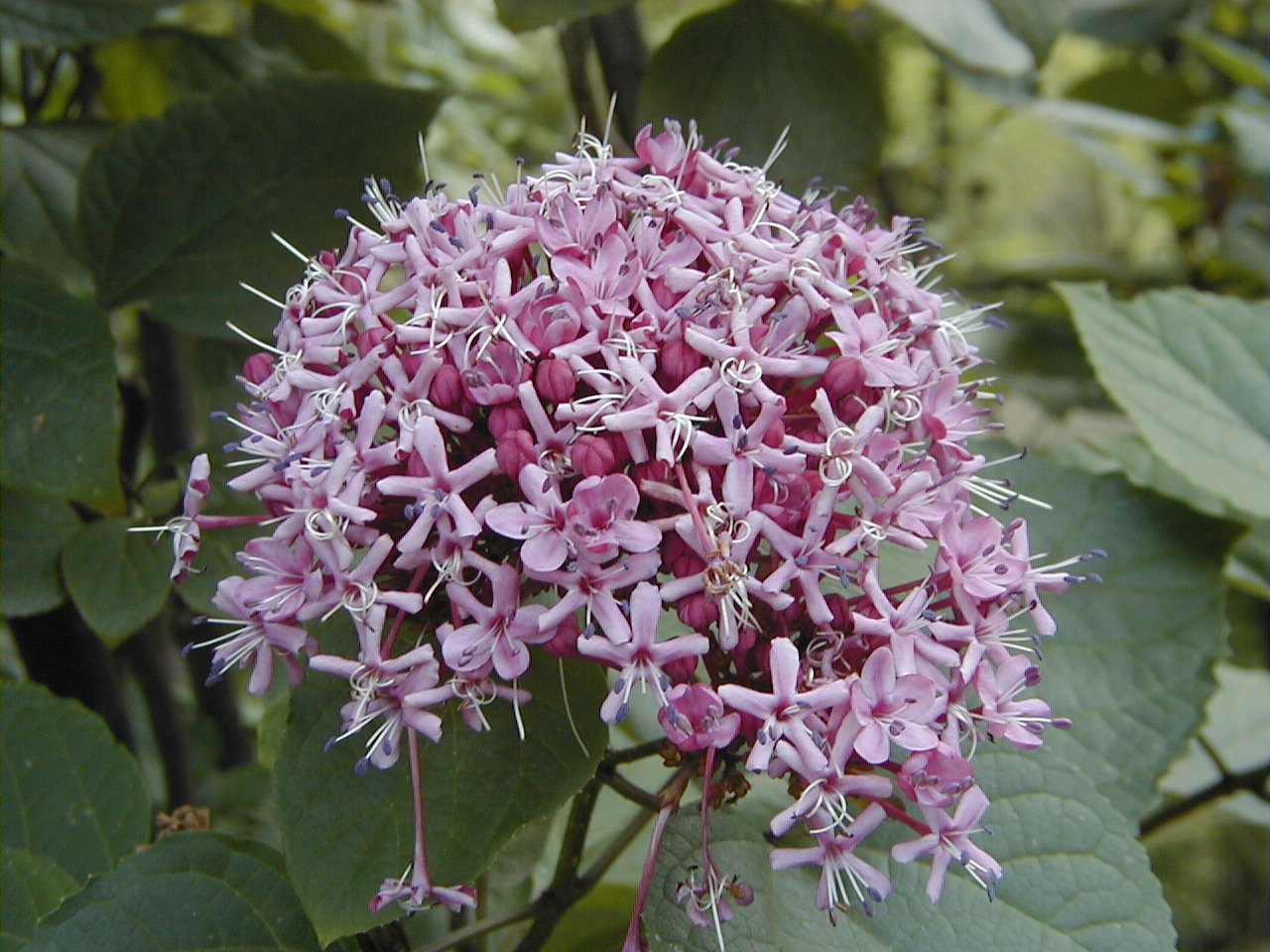 Clerodendrum bungei. Real Jardín Botánico de Madrid.